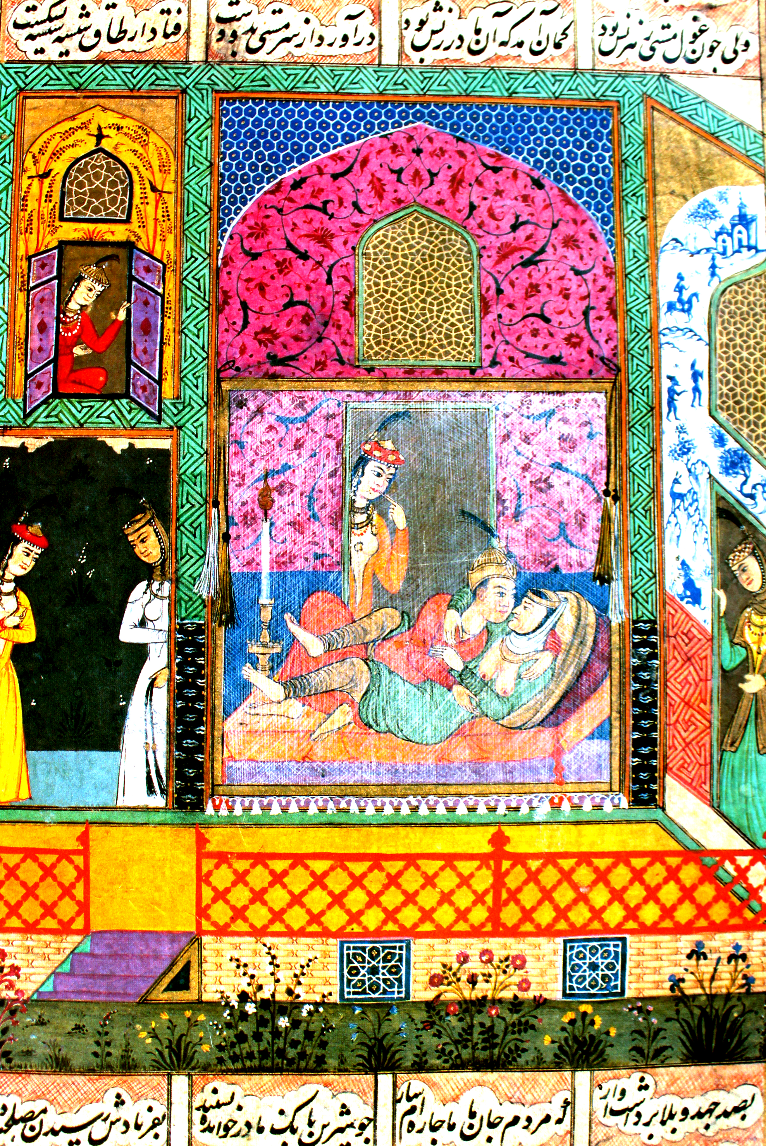 Xosrov bəylik taxtında, 1648, Buxara